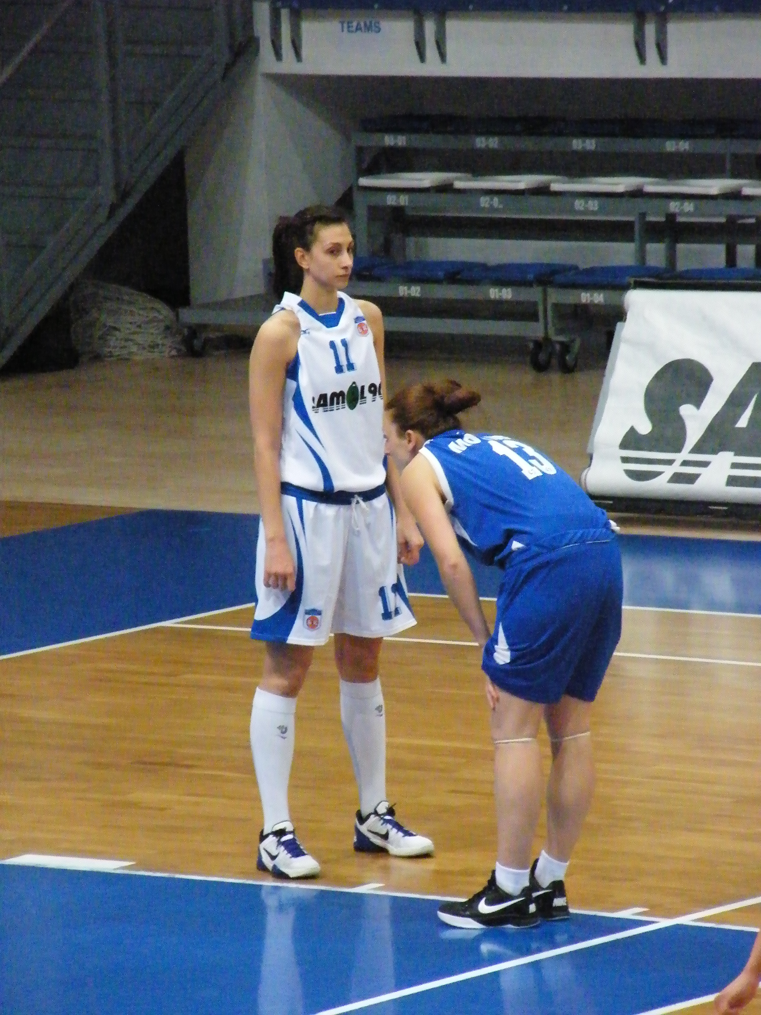 During the playoffs in season 2011-2012 in Bulgarian national league Zlatanova played two games with the team of Rilski Sportist where for 38 minutes she scored 37 points and 11 rebounds.